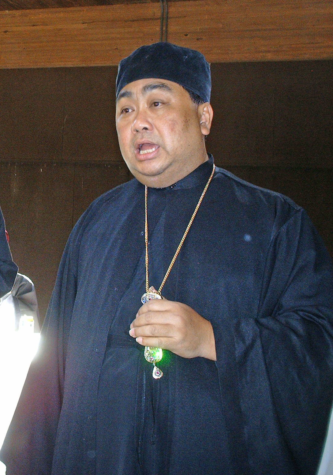 архимандрит Даниил (Бьянторо) в США